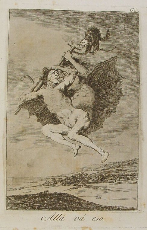 Capricho nº 66: Allá va eso de Goya, serie Los Caprichos